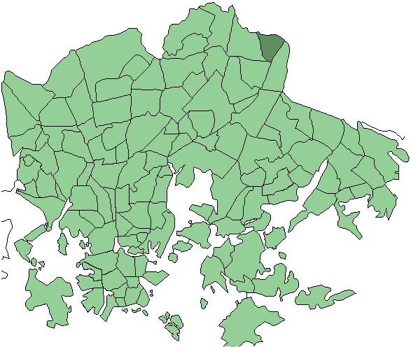 Districts of Helsinki, Heikinlaakso highlighted